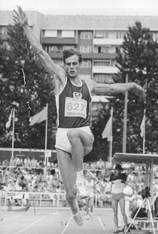 Marco Delonge ADN-ZB Koard 23.7.89 Neubrandenburg: 40. DDR-Leichtathletik-Meisterschaften. Im Weitsprung siegte Marco Delonge vom SC Dynamo Berlin. Er sprang 8,27 m und ließ damit Titelverteidiger Ron Beer hinter sich.